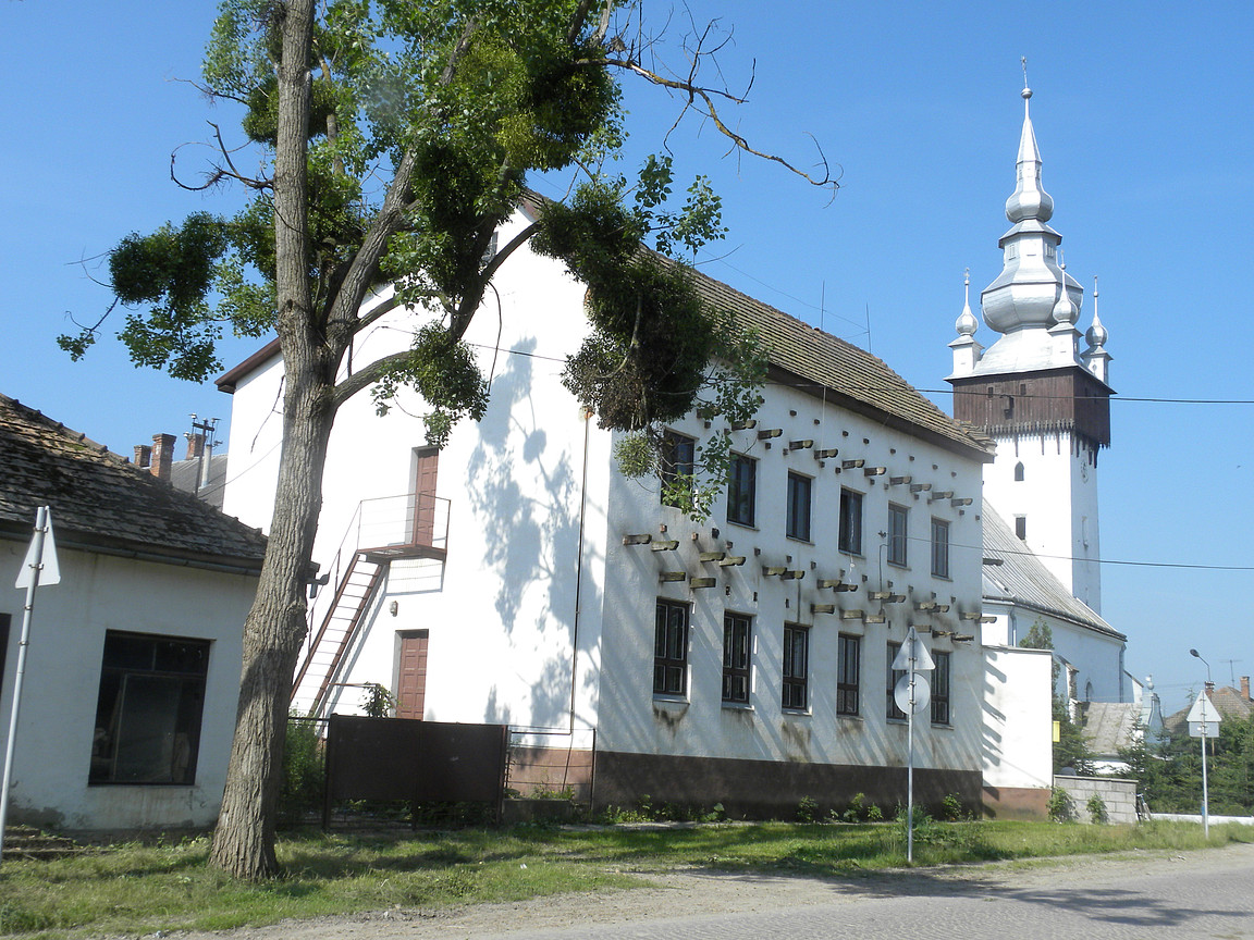 Vary